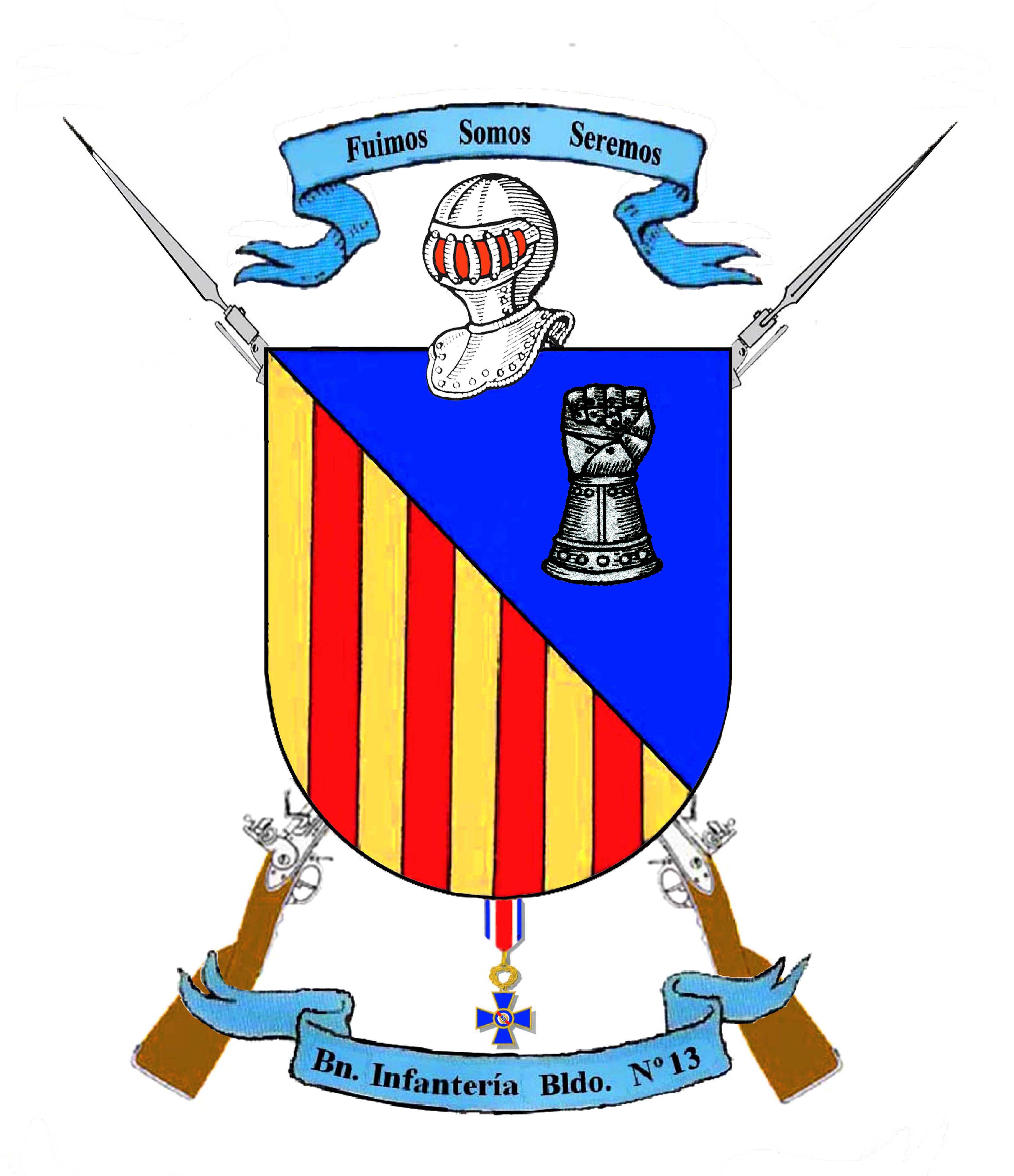 Escudo tronchado. Primero, campo en oro cargado con cuatro barras de gules. Segundo, en campo de azur cargado con un puño cerrado con un guantelete de acero bruñido.